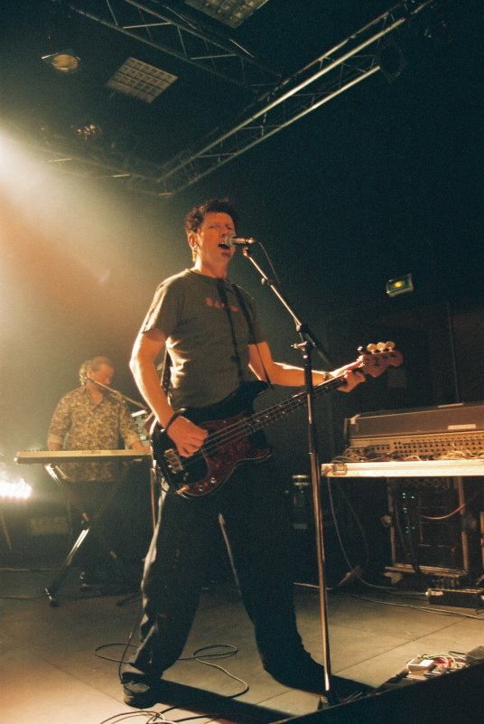 New Model Army en concert au Big Band Café, Caen/Hérouville Saint-Clair